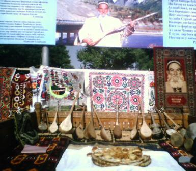 Струнные народные инструменты-Таджикабад 2011